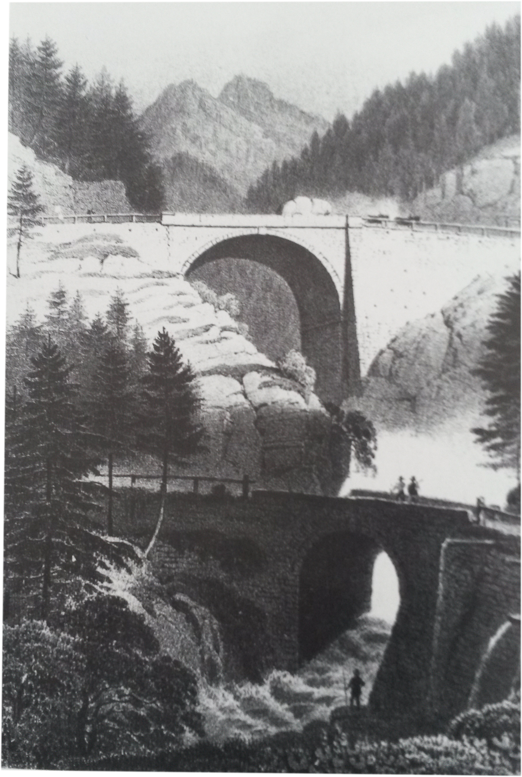 Die 19,7 m hohe und 22,8 m breite Bogenbrücke über den Myrthengraben für die zwischen 1839-1841 gebaute Trasse der Semmeringstraße. Ausgeführt wurde der Bau von der Fa. Tallachini. Zwei Wegtechniken werden gegenübergestellt: die alte Steinbrücke für die e. Abstieg nach der bereits beim Bärensattel erreichten Höhe und ein anschließend besonders steiler Wiederanstieg nötig war und die neue, hoch in den Himmel ragende Brücke, die einen gleichmäßigen Anstieg erlaubte.